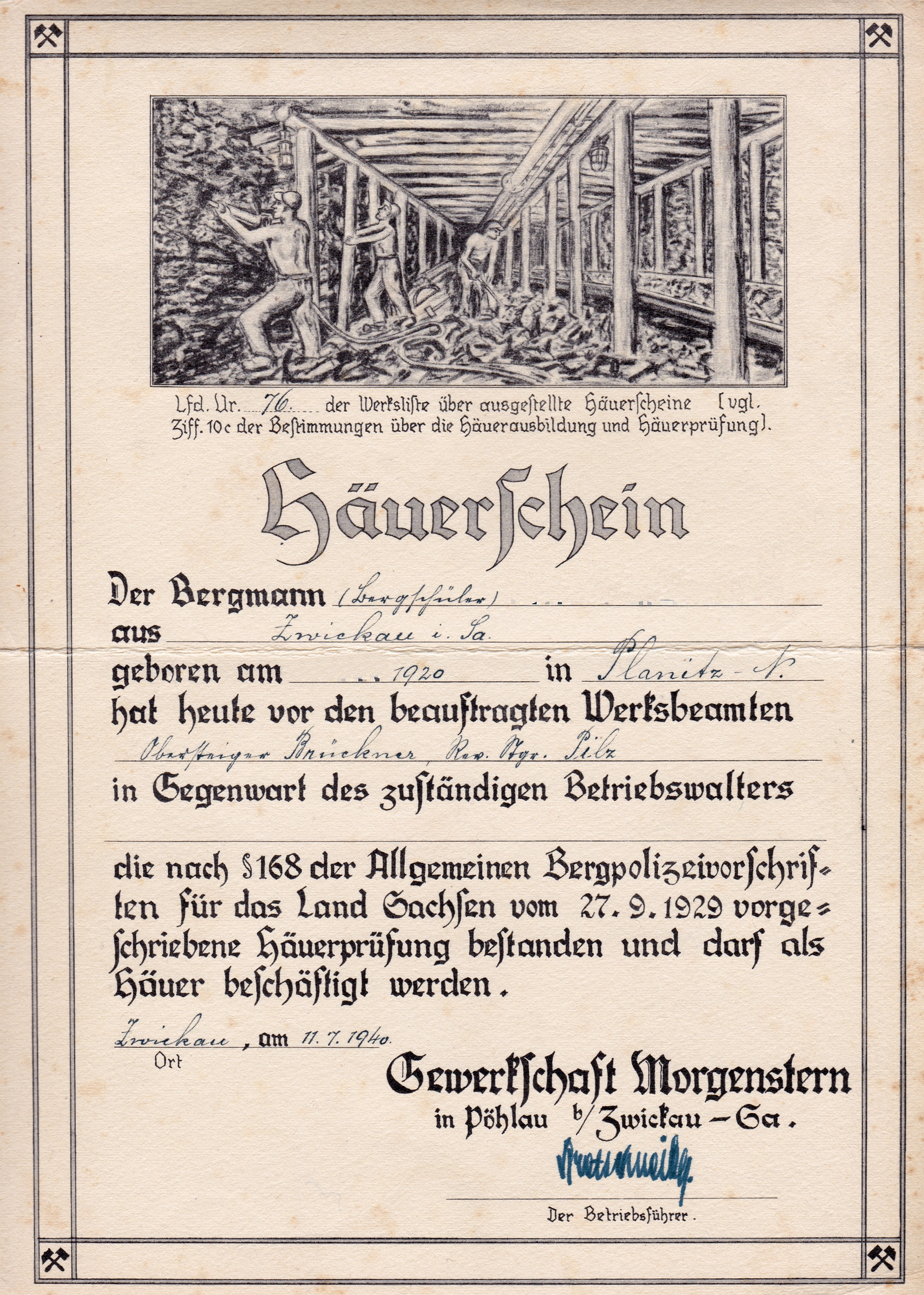 Häuerschein der Gewerkschaft Morgenstern in Sachsen von 1940. Anonymisiert.